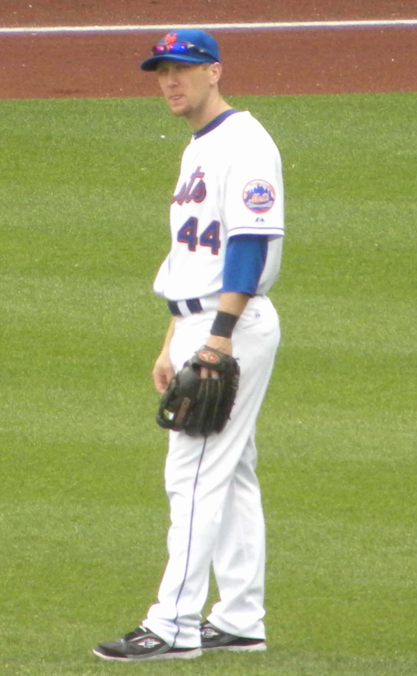 Jason Bay